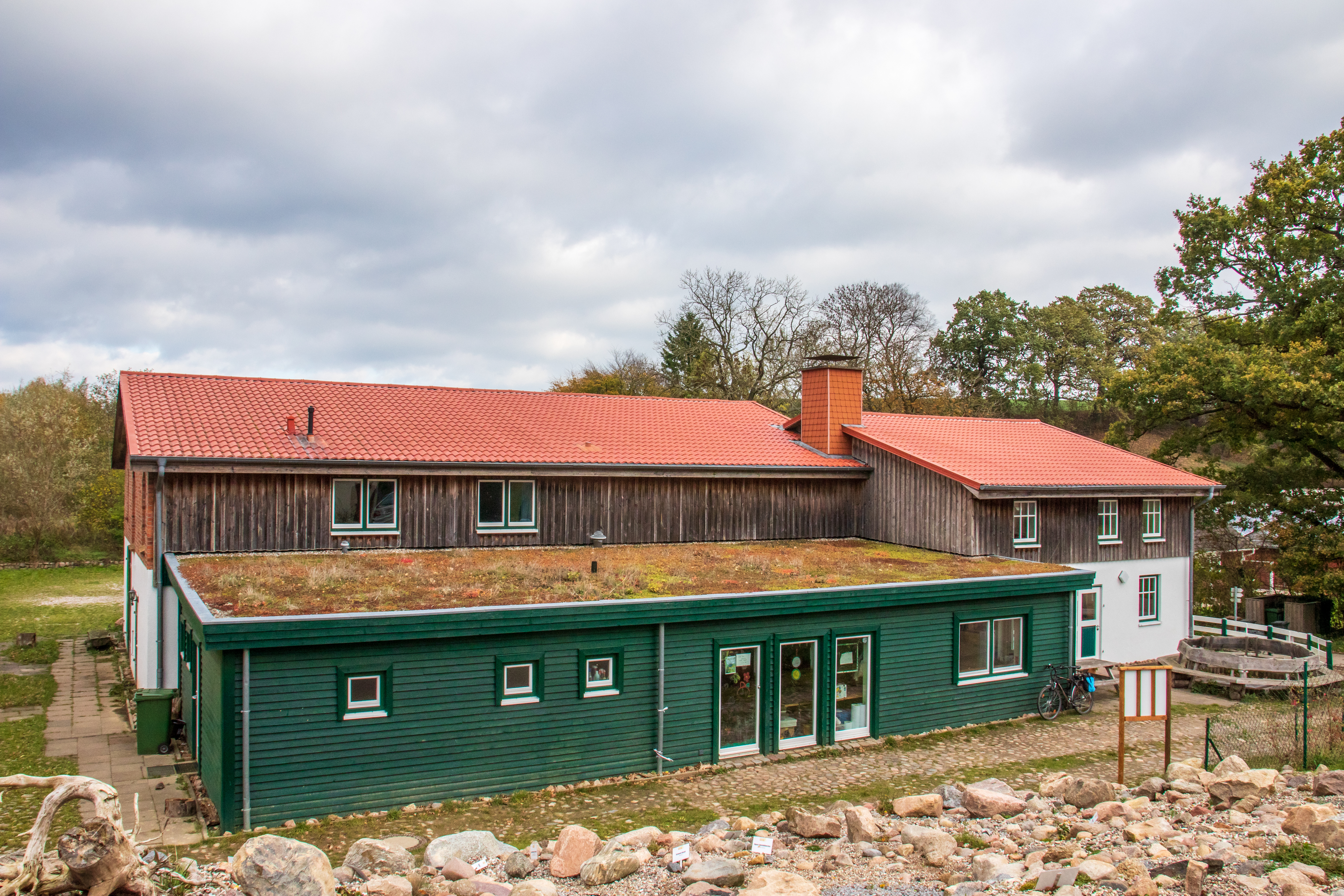 Das Eiszeitmuseum in Lütjenburg